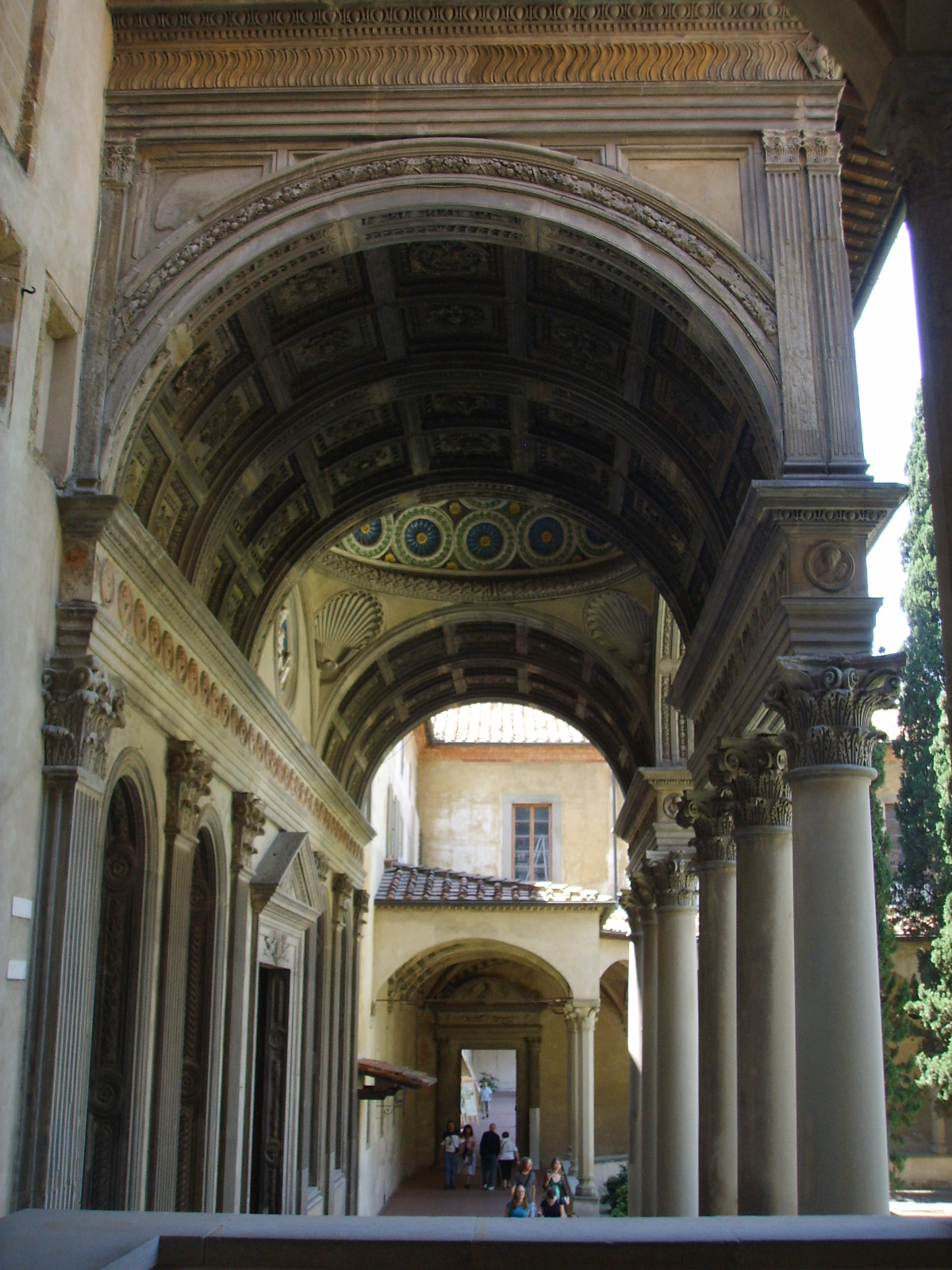 Santa Croce church, cappella dei Pazzi, side view, in Florence, Italy